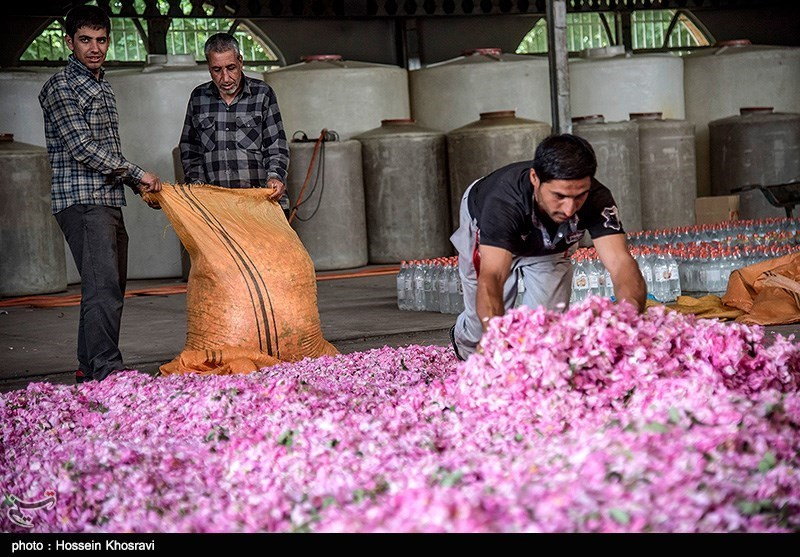 گلاب گیری در میمند - فارس